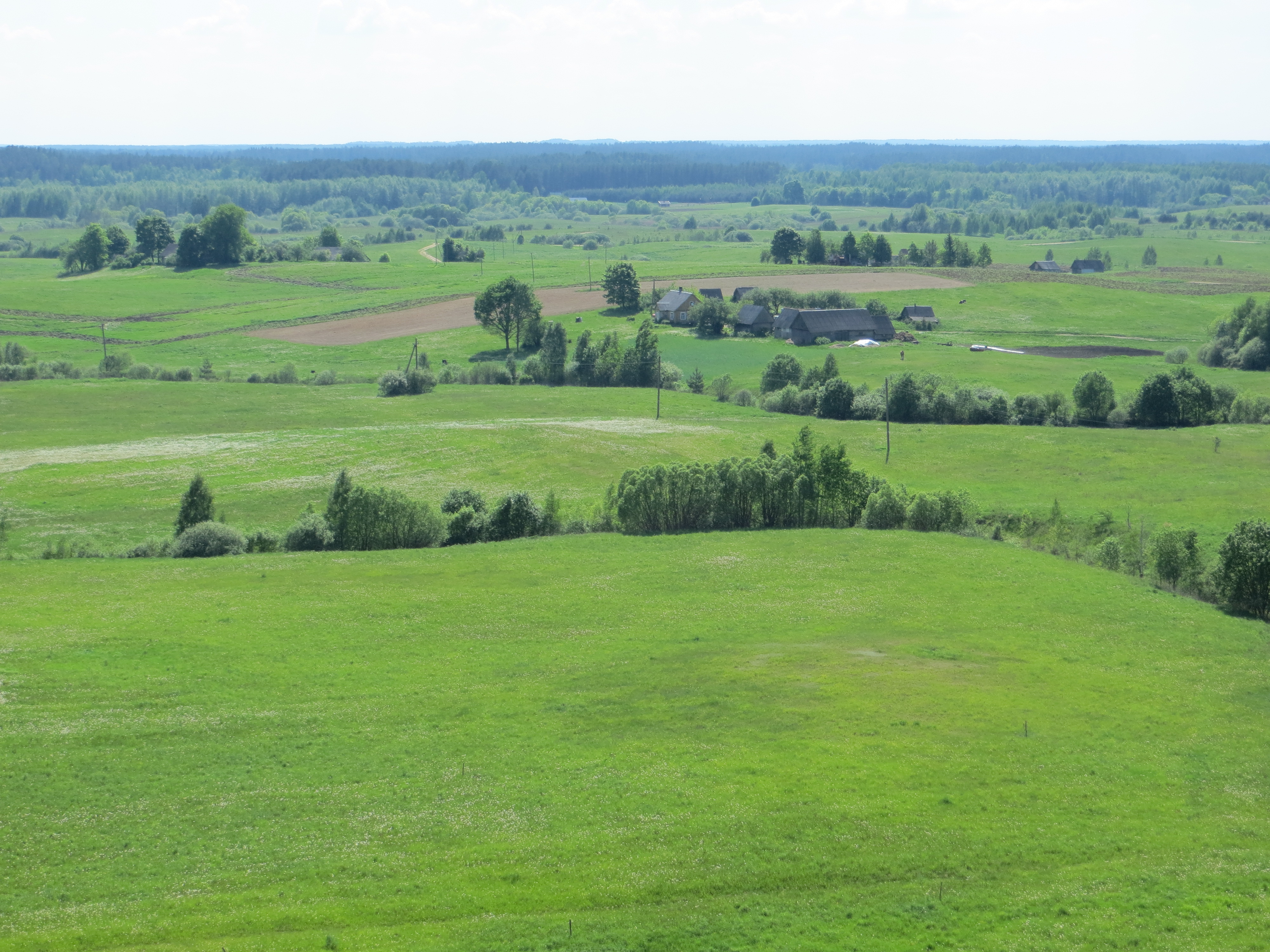 Joniškis, Lithuania